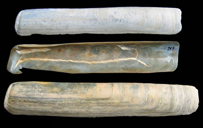 Solen marginatus